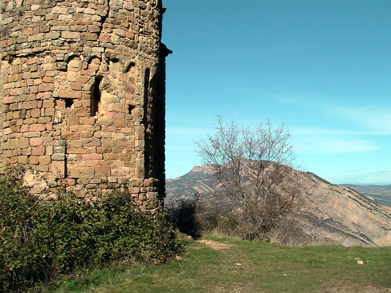 Castell i església de Santa Maria de Rúbies (Camarasa): absis